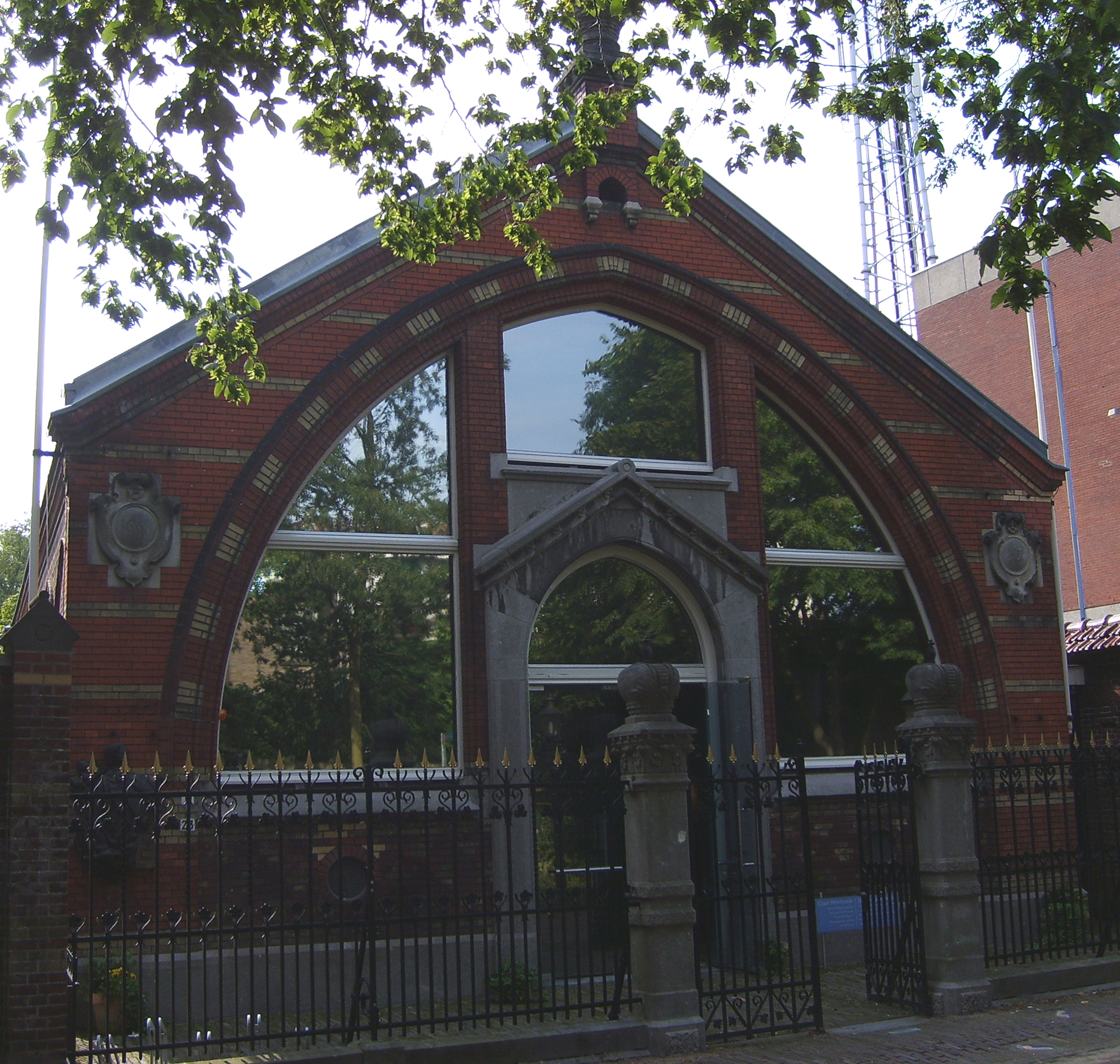 Tsaar Peterhuisje in Zaandam.